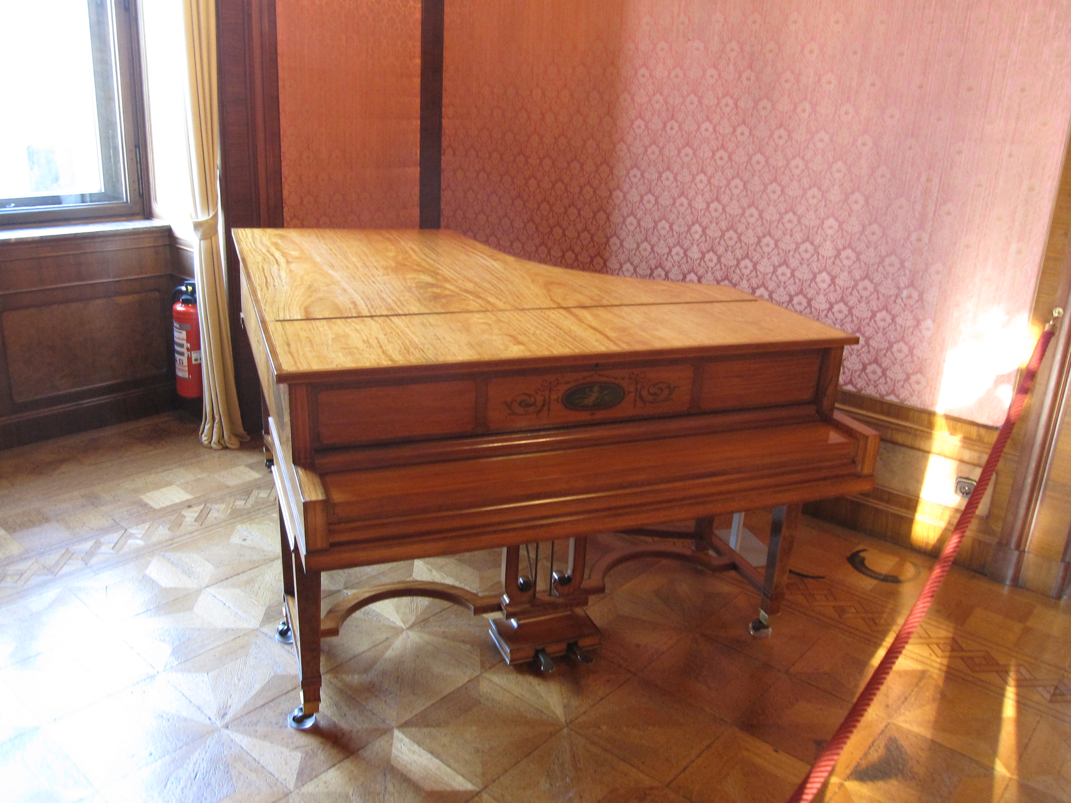 Flügel aus dem Jahr 1905. Zitronenholzfurnier mit Einlegearbeiten und Bemalungen. Der Flügel im Empire-Stil wurde um 1905 von dem Hof-Piano-Fabrikanten Rud. Ibach Sohn aus Barmen für das Musikzimmer der Familie Krupp in Villa Hügel angefertigt. Den Entwurf für das Instrumentengehäuse lieferte die Mainzer Hofmöbelfabrik A. Bembé. In drei gemalten ovalen Medaillons sind Allegorien der Musik dargestellt: Frauengestalten in fließenden Gewändern tragen als Attribute der Musik verschiedene Instrumente. Rechte Seite: Frauengestalt mit Tamburin und geflügelter Putto mit Laute. Rückseite: Frauengestalt mit Lyra und Schwan. Linke Seite: Frauengestalt mit Posaune und Putto mit Triangel. Der Flügel wurde der Alfried Krupp von Bohlen und Halbach-Stiftung im Jahre 1997 von den letzten Eigentümern Ilse und Raimund Kluber, Darmstadt, übereignet. Die Stiftung ermöglichte 1998 die umfassende Restaurierung des Instrumentes.